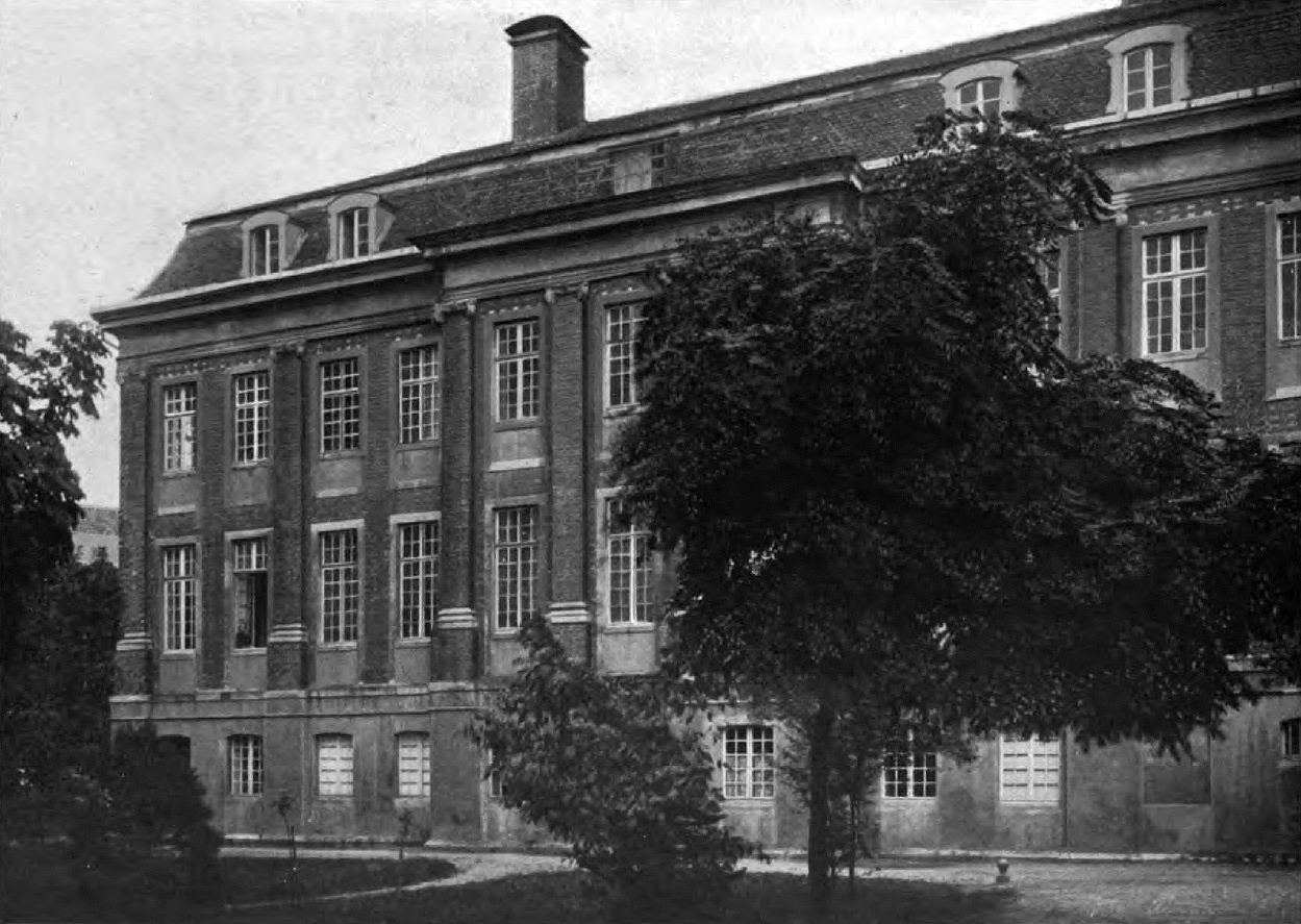 Gartenseite des Beverförder Hofs in Münster